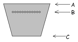 schéma en coupe d'une courroie trapèzoïdale